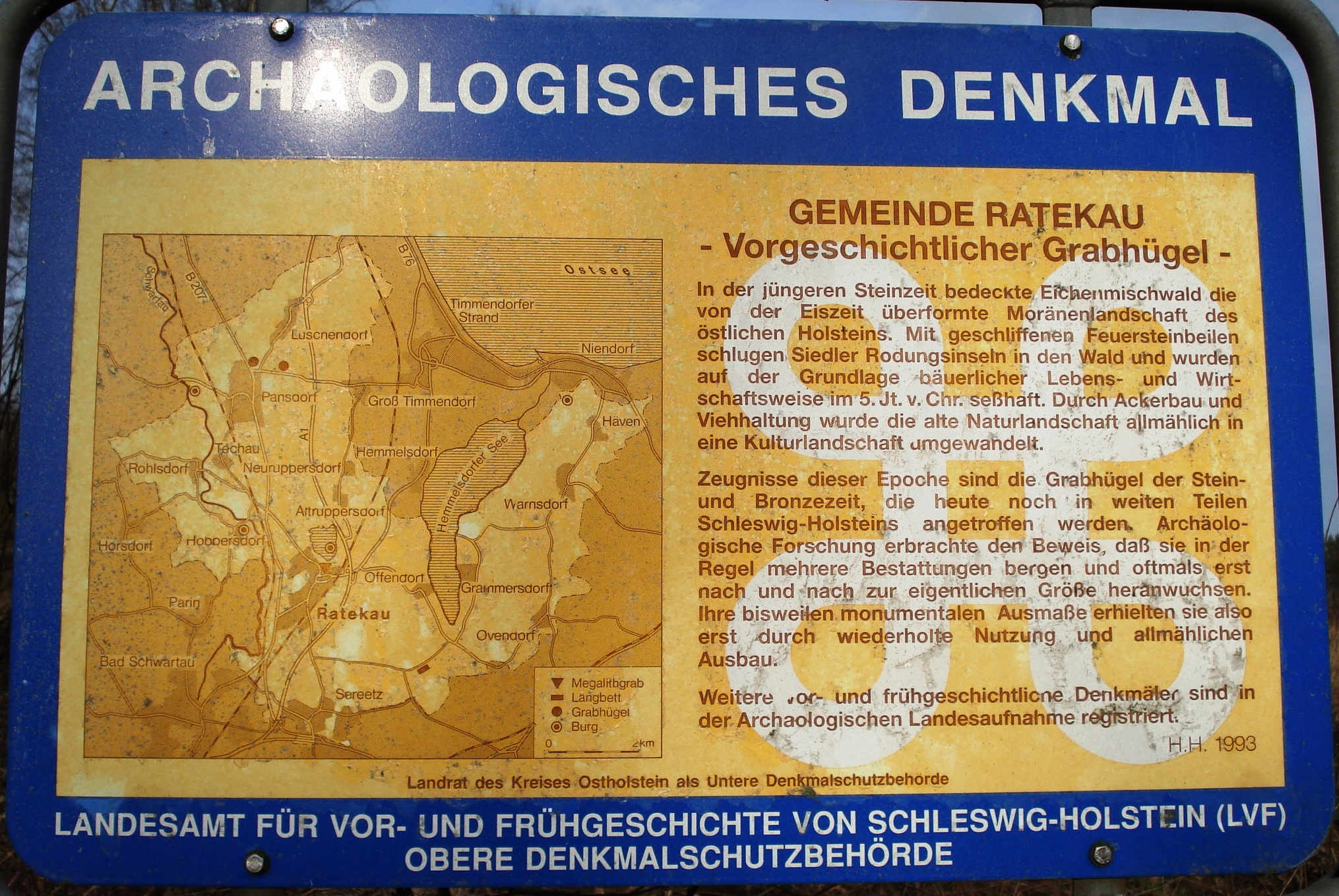 Tafel am Grabügel in Pansdorf